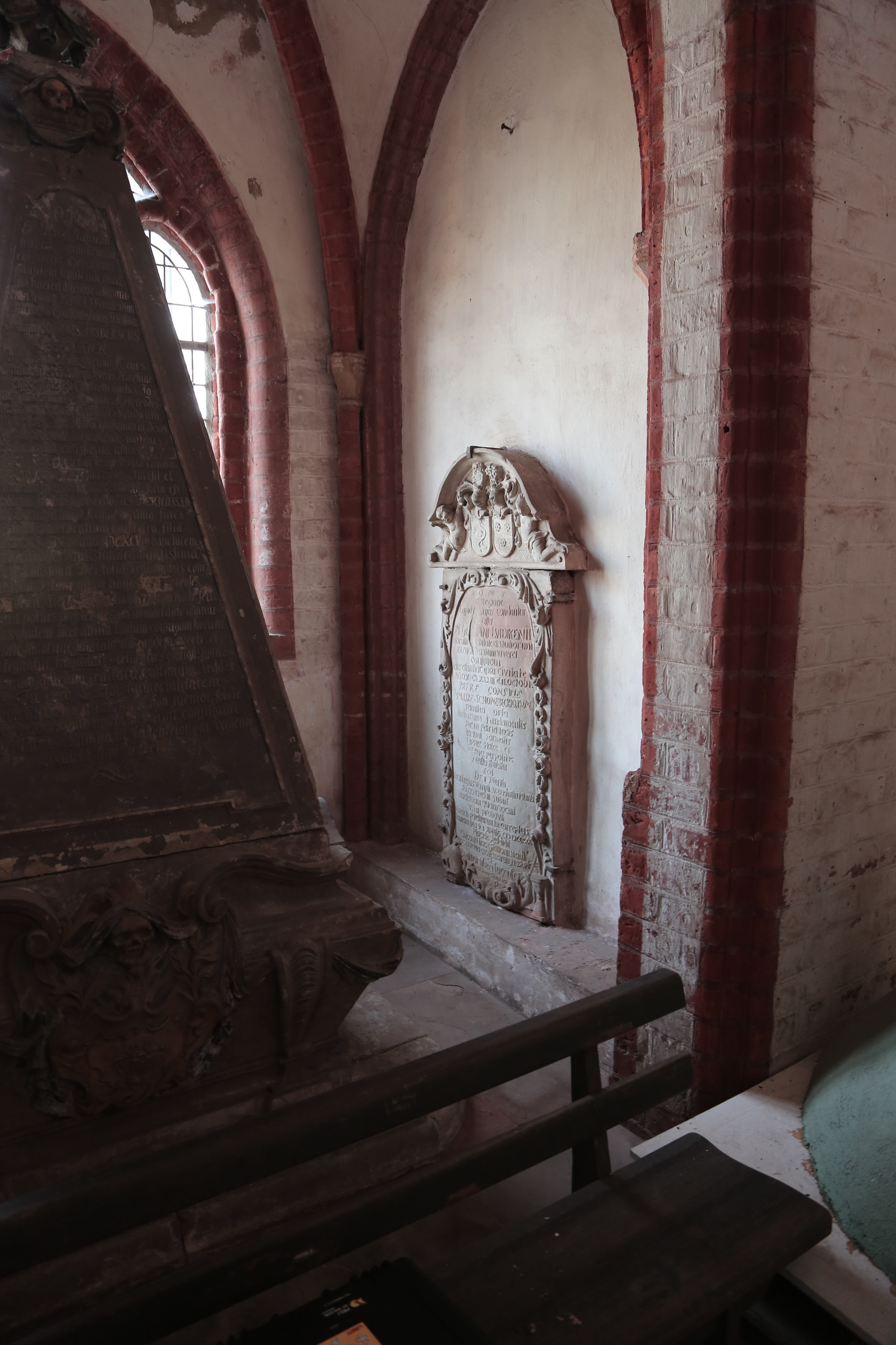 Das Grabmal von Germanus Lüdke im Dom zu Stendal, Altmark, Deutschland.